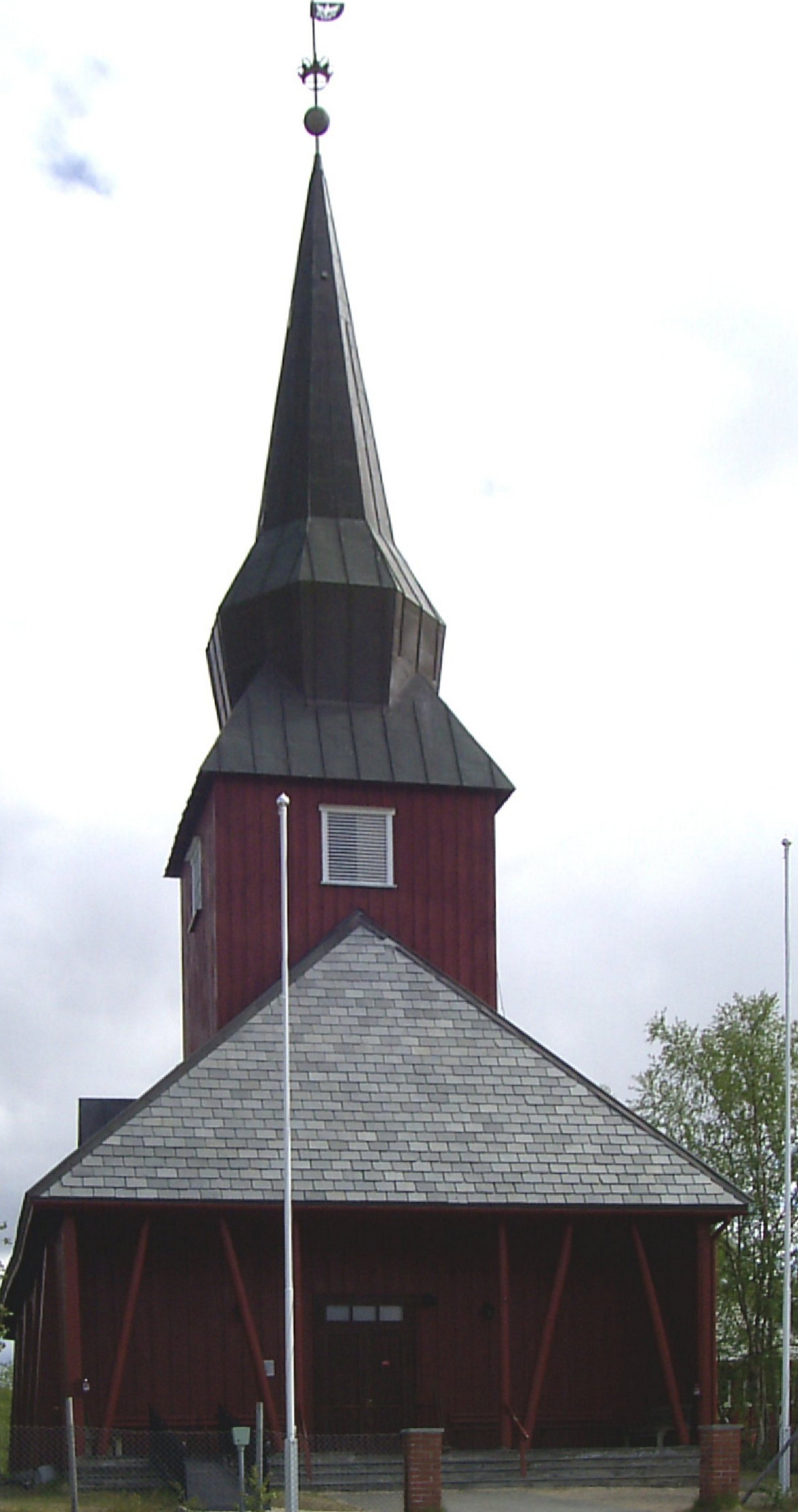 Davvisámegiella: Guovdageaidnu Girku, Lápmi